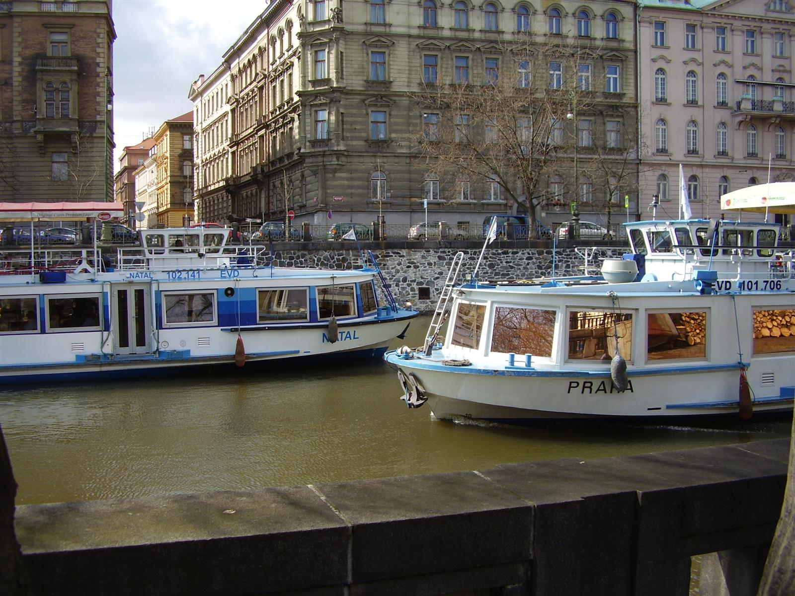 Česky: Dvě potkávající se motorové lodi (Praha a Natal, obě EVD) u Dětského ostrova v Praze (proti Malátově ulici)